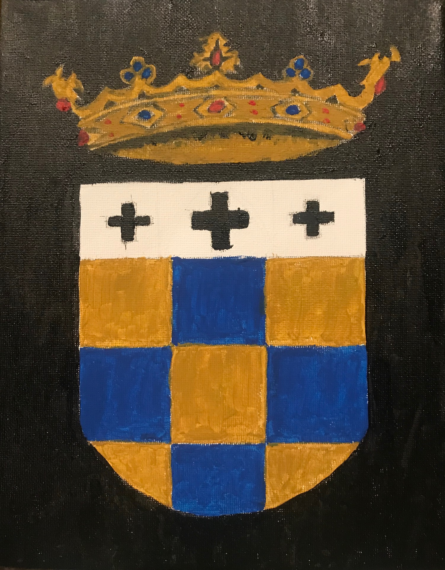 Marquesado de Antella